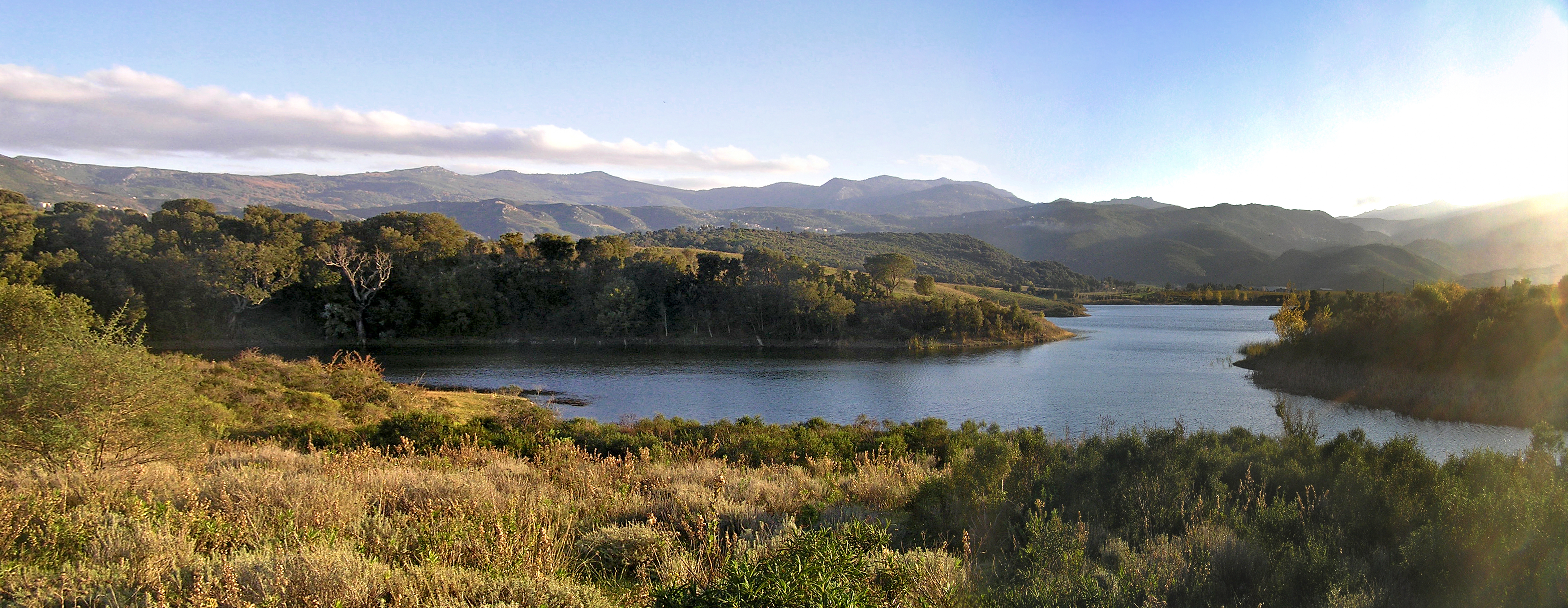 Oletta (Corse) - Panorama du lac de Padula